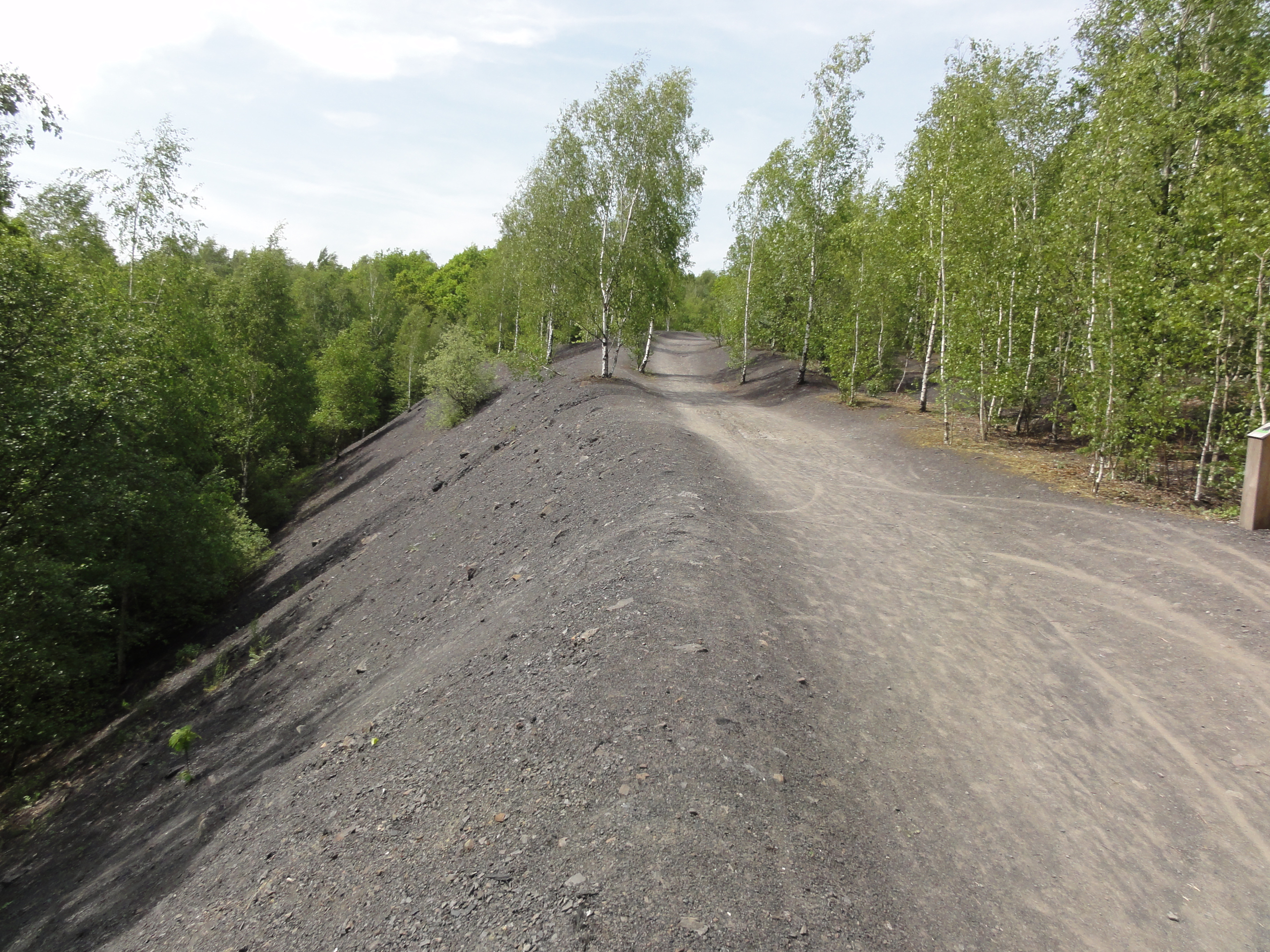 Terril n° 175A dit Sabatier Nord plat, Fosse Sabatier de la Compagnie des mines d'Anzin, Raismes, Nord, Nord-Pas-de-Calais, France.